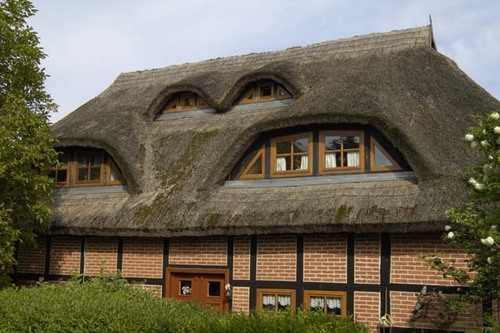 Fachwerkhaus in Altensien. Altensien ist ein Ortsteil des Ostseebades Sellin auf der Insel Rügen